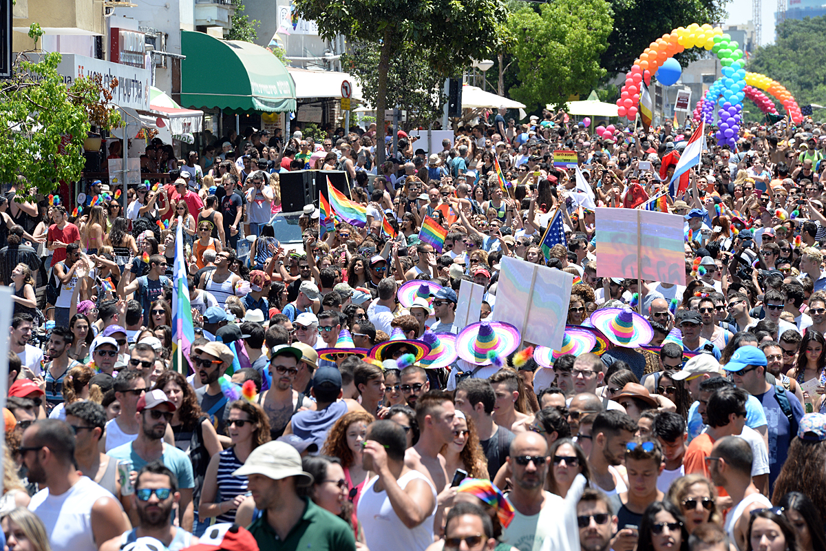 Tel Aviv LGBT pride parade 2015 Tel Aviv Gay Pride Parade 2015